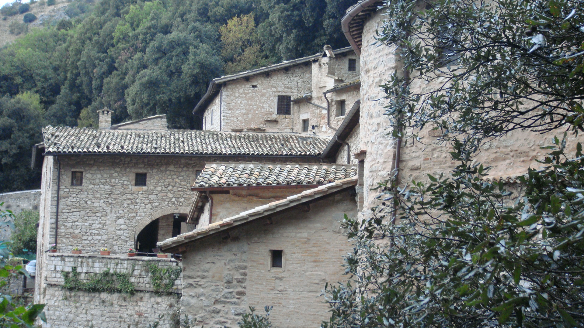 PANORAMICA DELL'EREMO SUL MONTE CUCCO